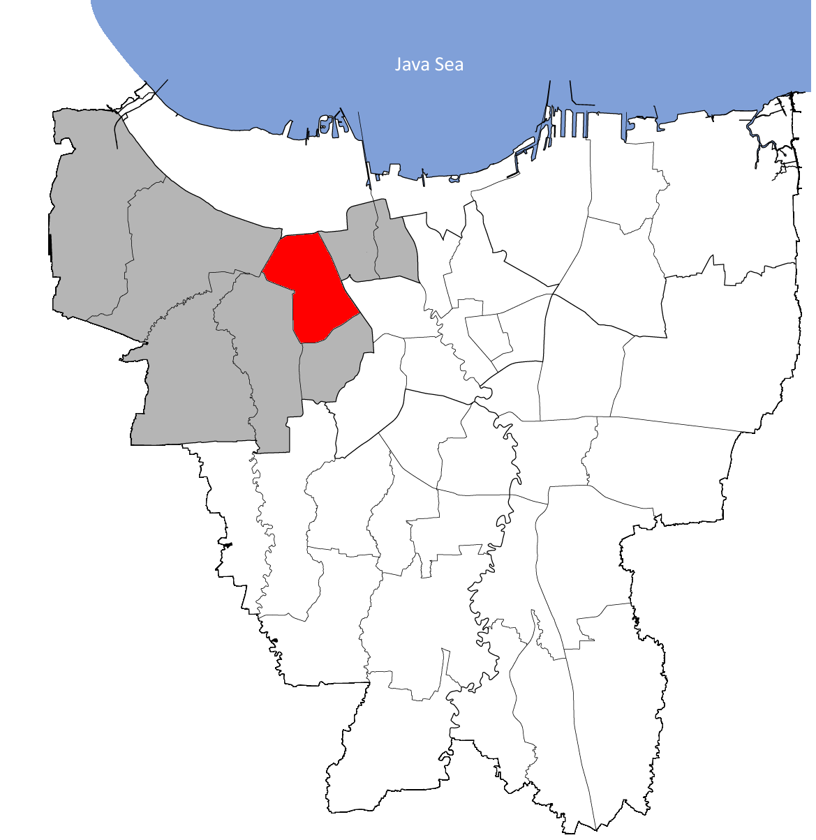 Grogol Petamburan;onderdistrict (Kecamatan) van West-Jakarta